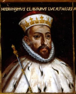 Dipinto del doge Gerolamo Chiavari